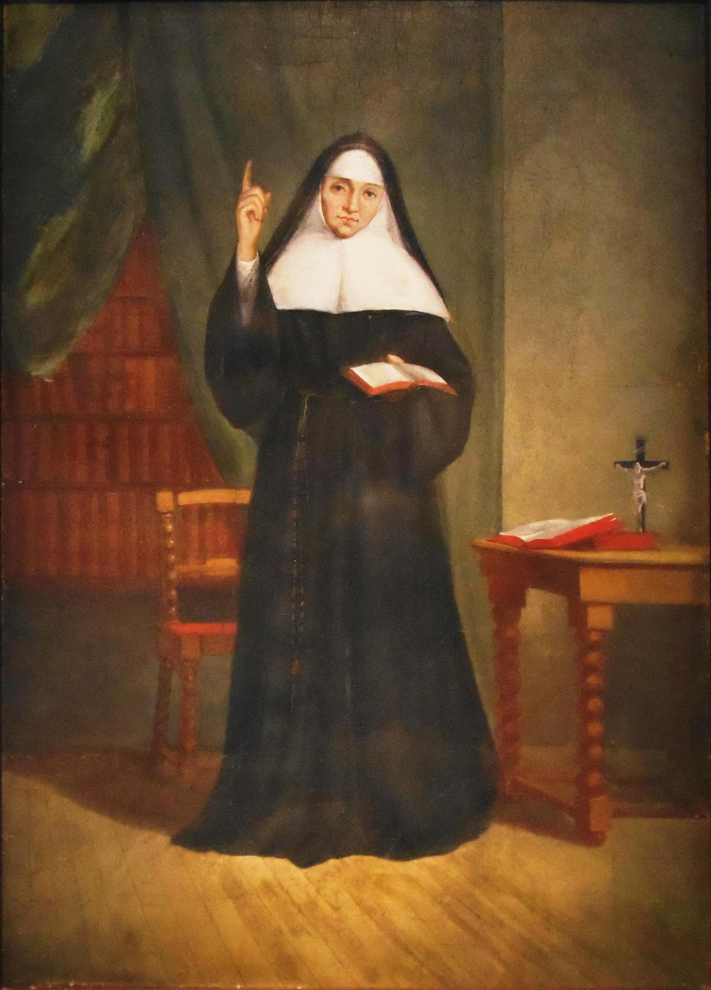 Vénérable Marie de l'Incarnation